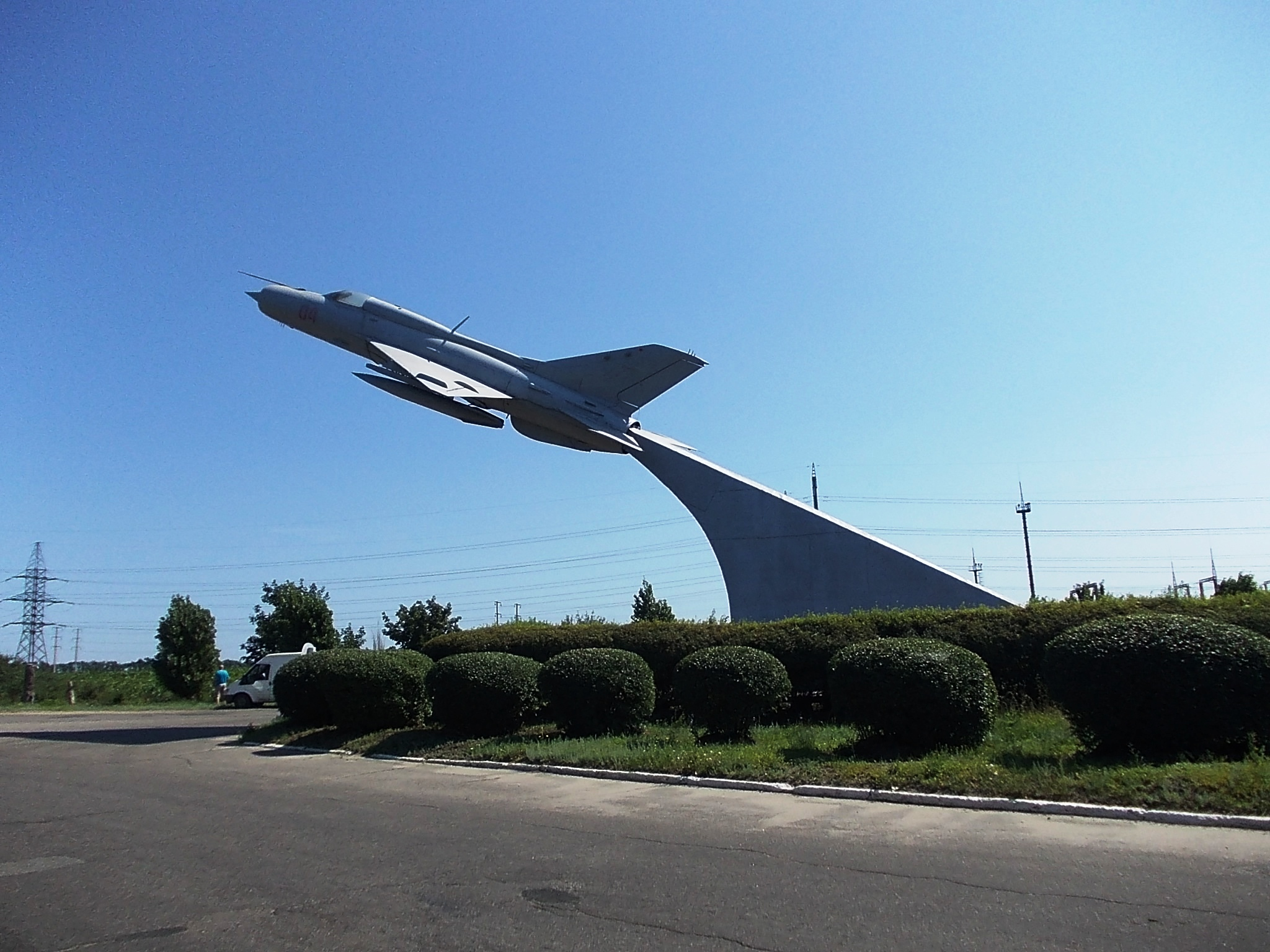 Пам’ятний знак воїнам 108-го штурмового Рава-Руського ордена Суворова авіаполку, які брали участь у визволенні Куп’янщини від фашистських загарбників., Ківшарівка